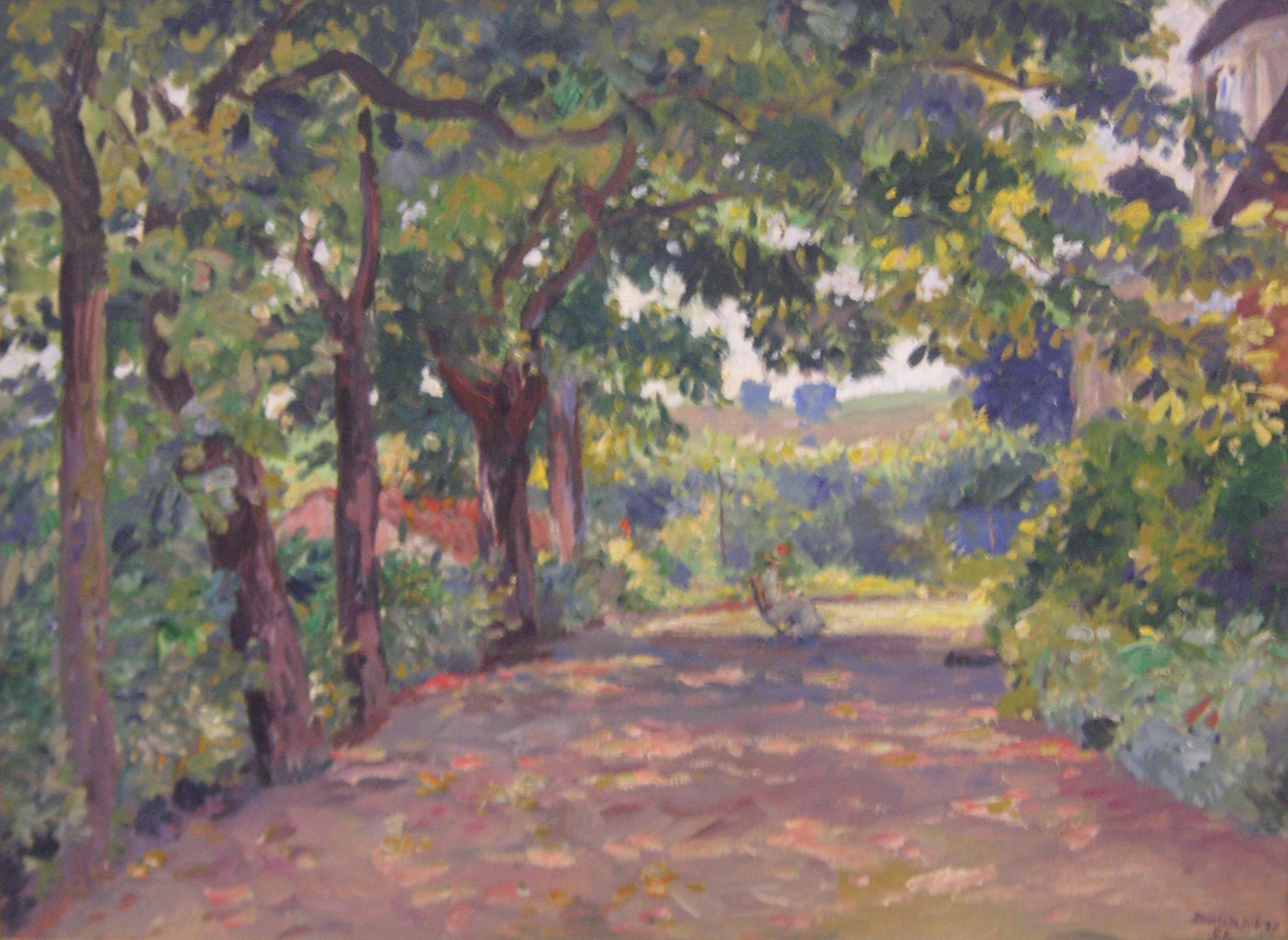 Schlossgarten in Bonnland, 1897, Öl auf Leinwand, Städtische Sammlung Museum im Kulturspeicher Würzburg